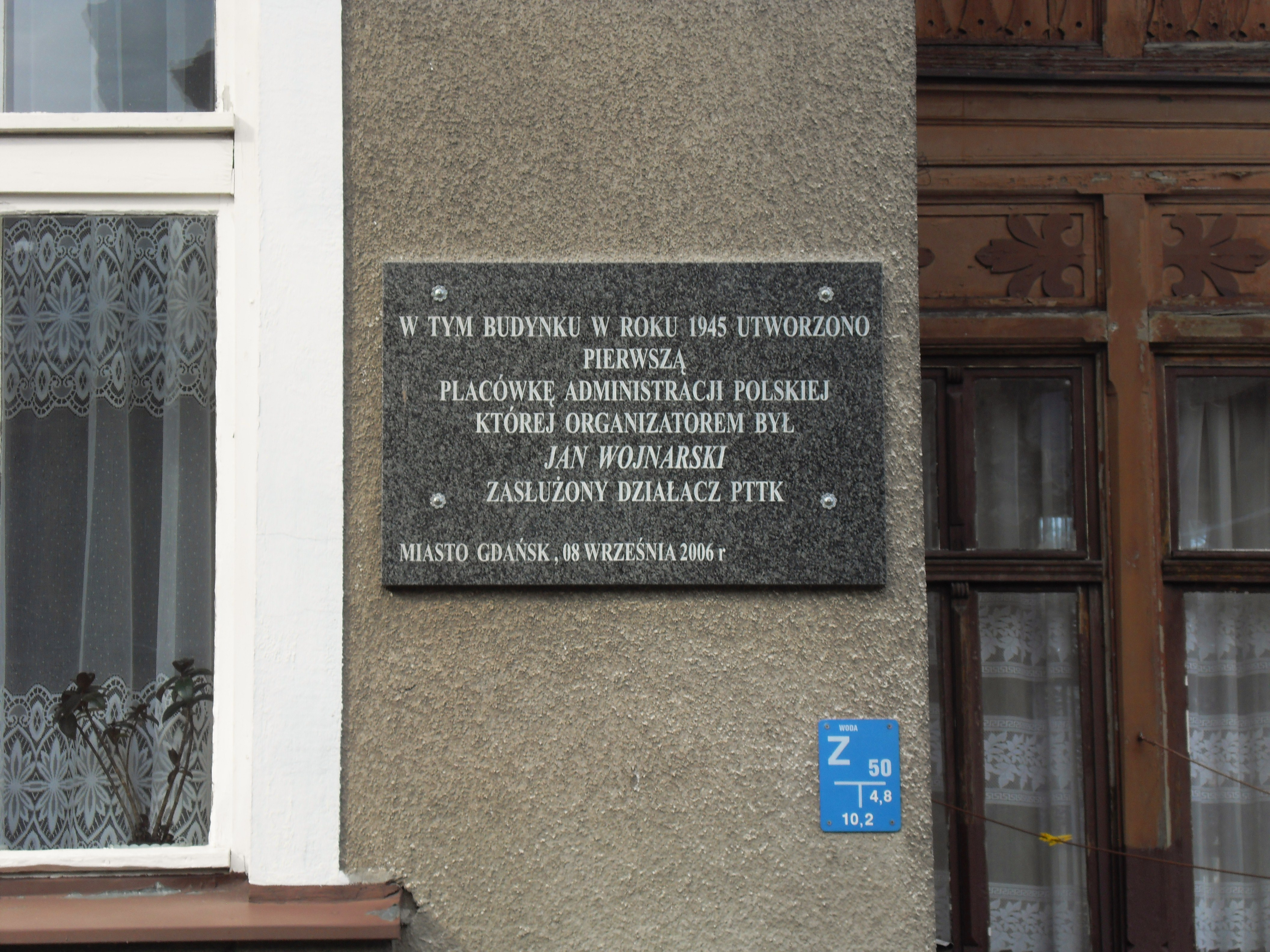 Gdańsk Oliwa, ul. Obrońców Westerplatte 34. Tablica, Jan Wojnarski.